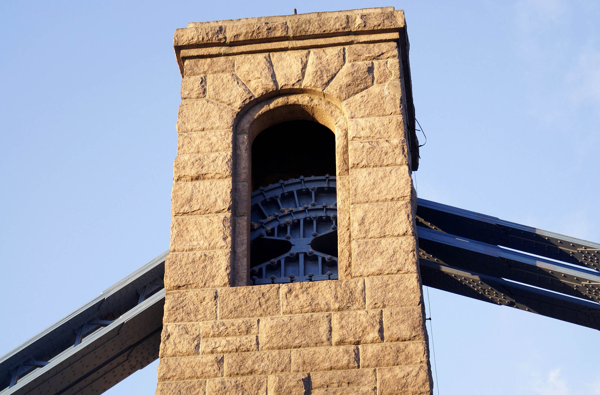 Wrocław, Most Grunwaldzki, 1907